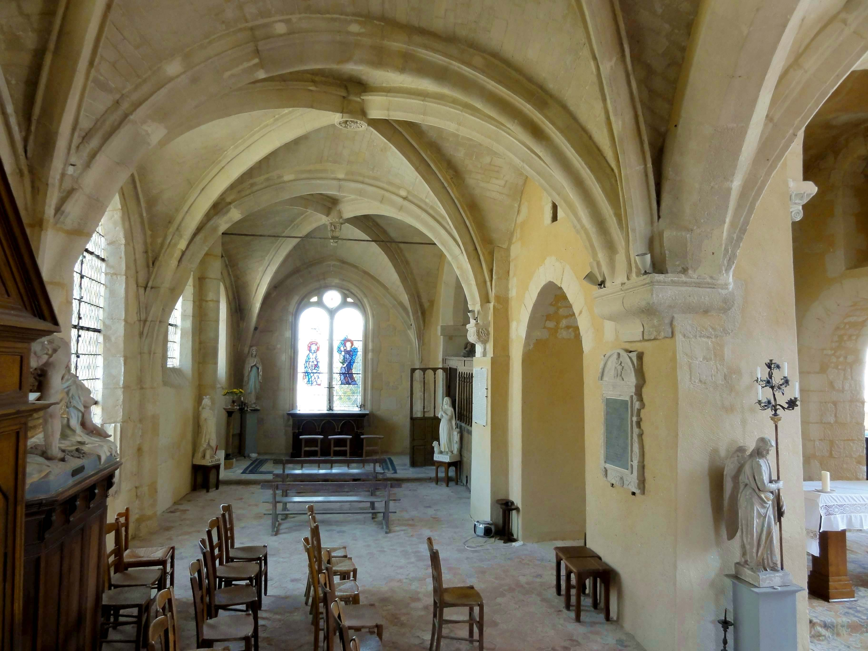 Intérieur de l'église (voir titre).